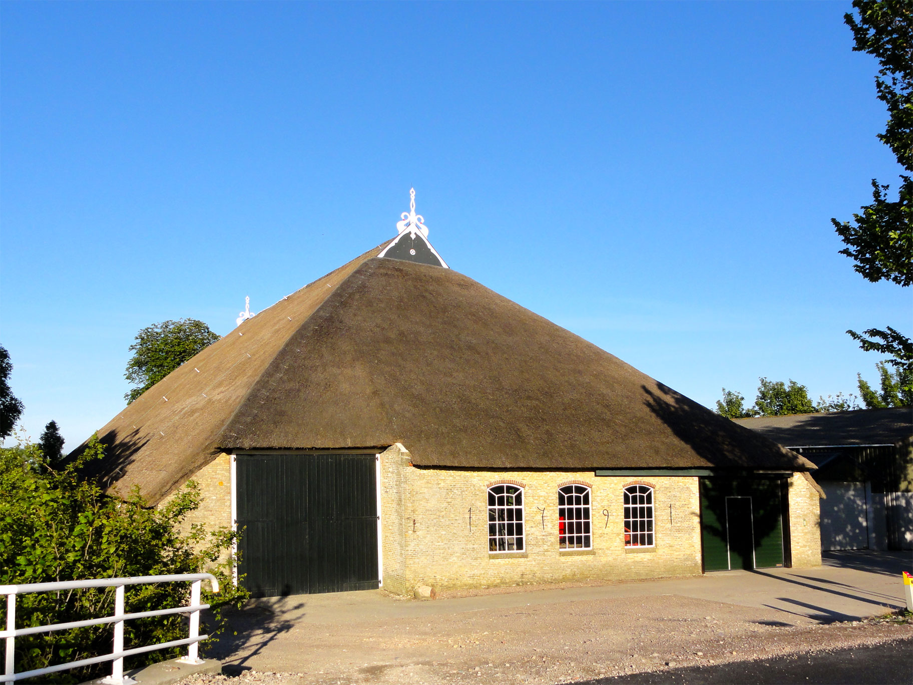 Stadhoudersweg 80 in Sint-Annaparochie